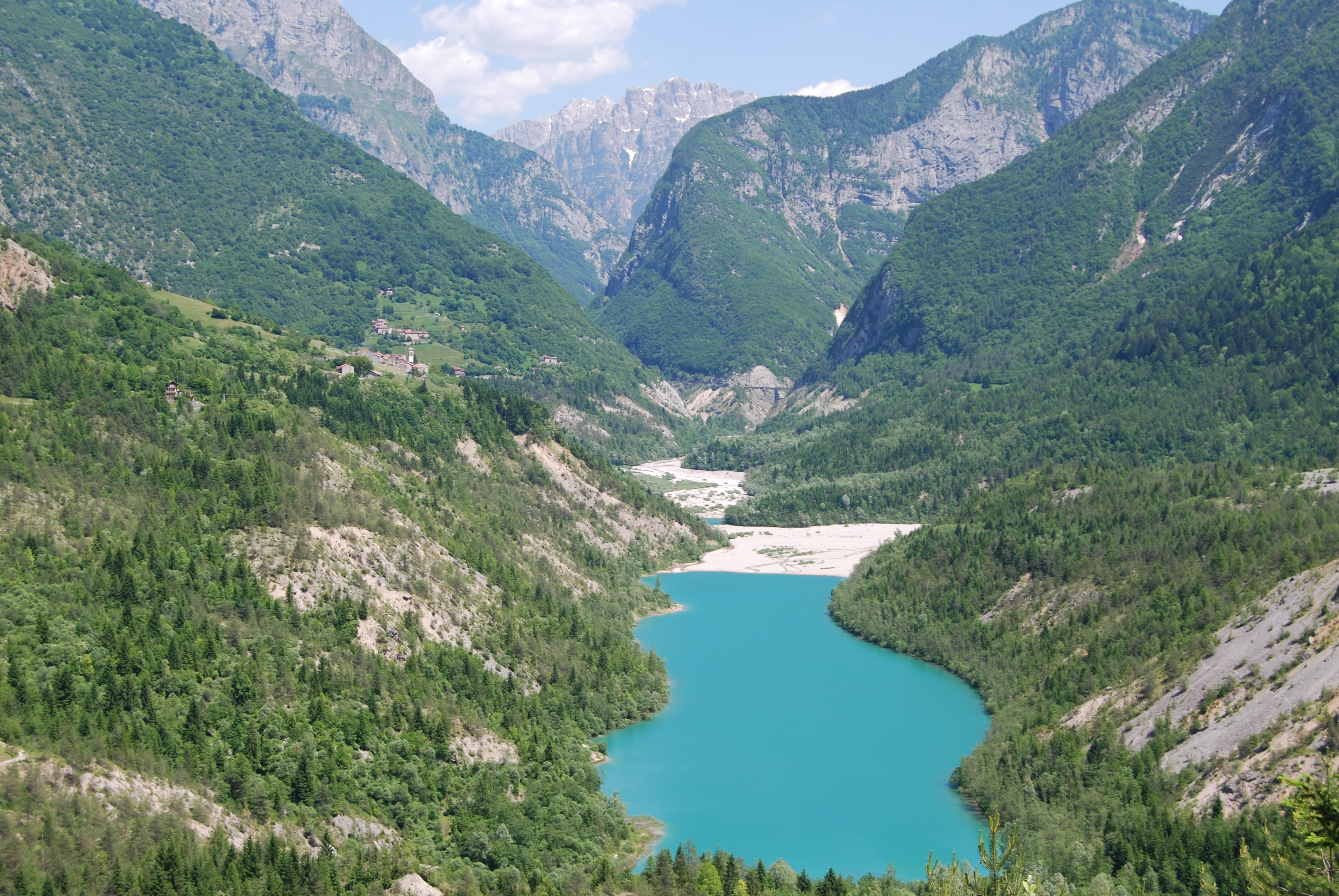 La valle del Vajont a monte della frana del monte Toc, con il lago residuo